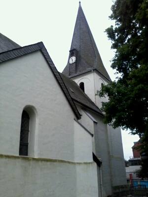 Hiesfelder Dorfkirche Nordansicht